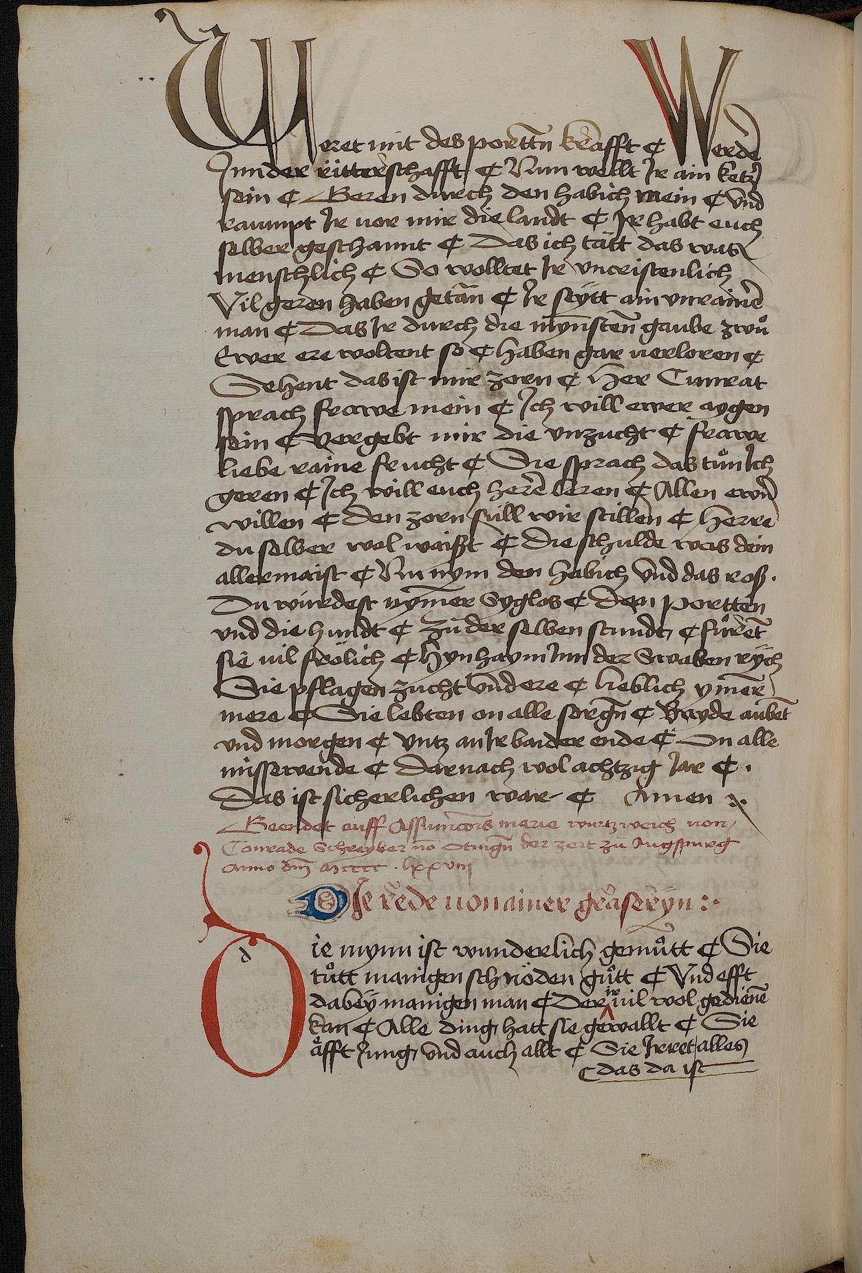 Codex Palatinus germanicus 4, Blatt 208v der Handschrift: "Die Graserin", Seite 1.